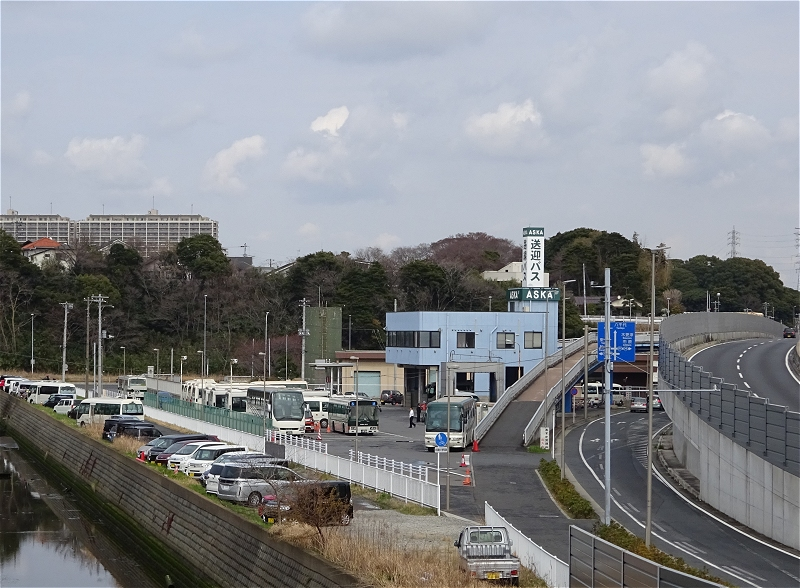 あすか交通本社